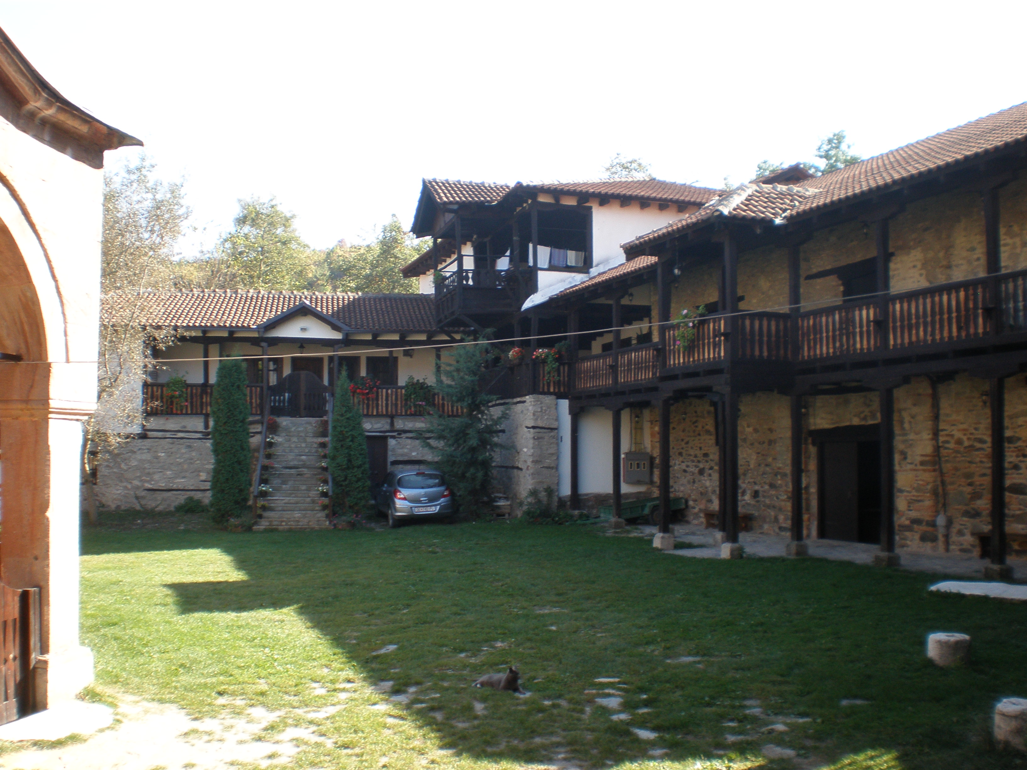 Конаците на Марковиот Манастир